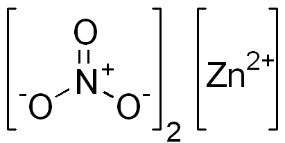 chemical structure of zinc nitrate